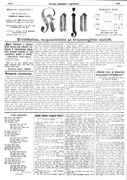 Narva ajaleht Kaja 2 september 1906